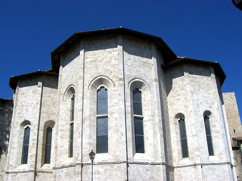 Ascoli Piceno - Abside della Chiesa di S. Pietro Martire